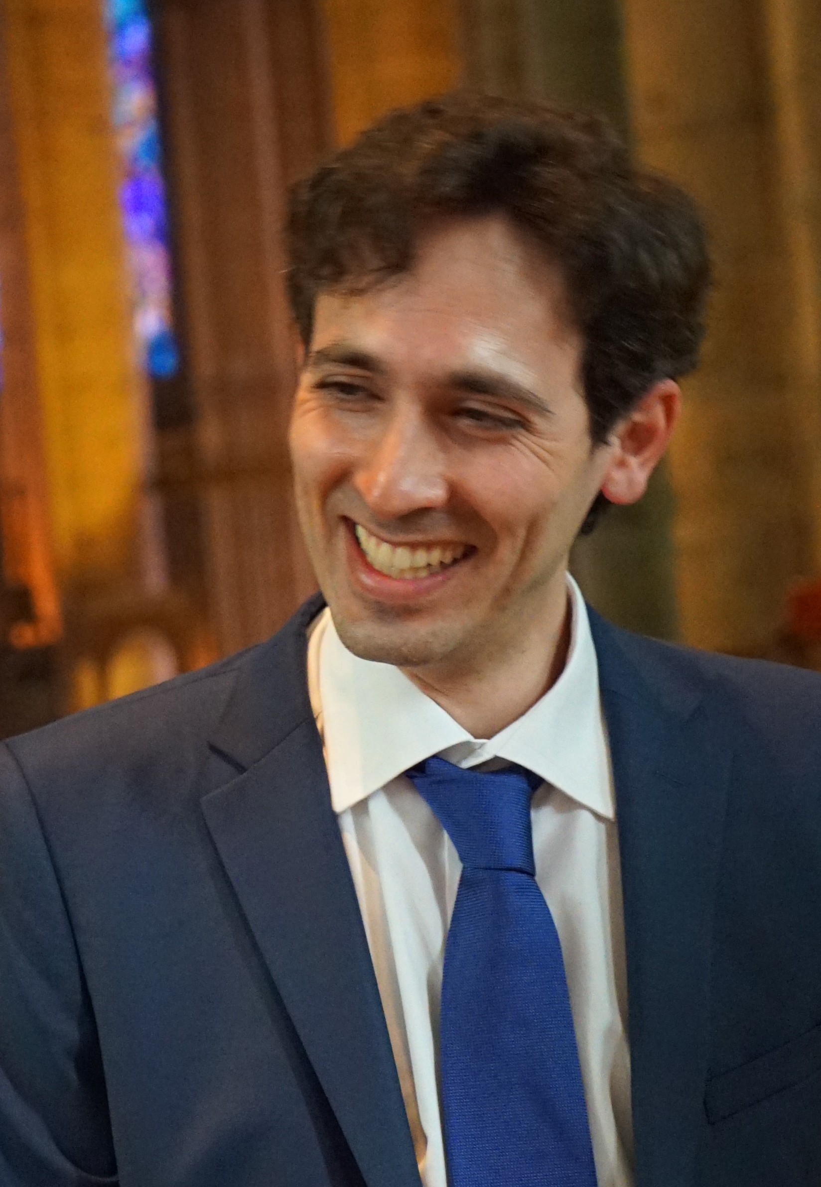 concert en la cathédrale de Reims lors des Flâneries musicales 2017.